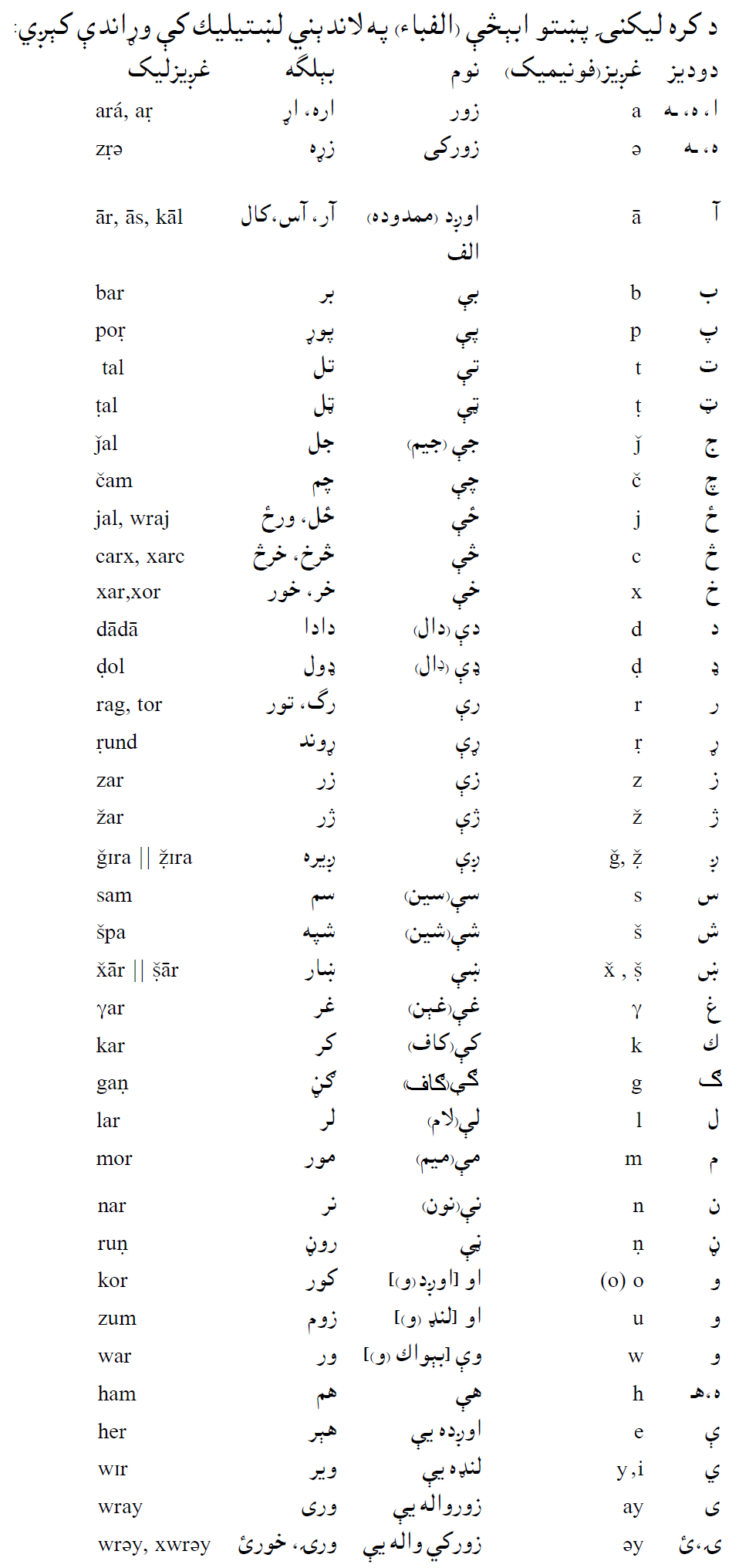 پښتو: ګاف GAF